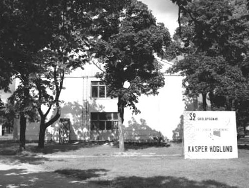 Bygget av skolhuset på S 2, fästningen Karlsborg. Byggnadsfirma Kasper Höglund